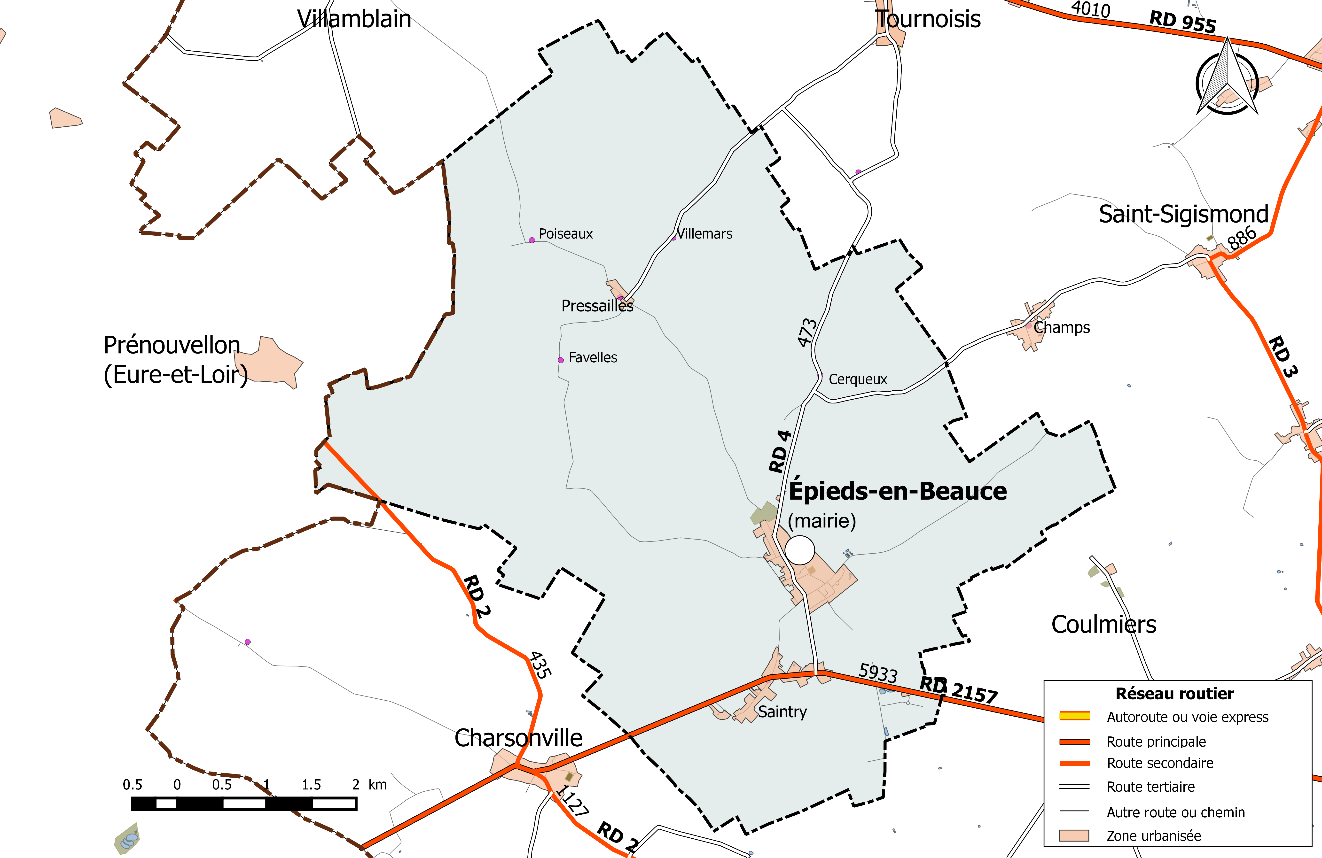 Carte du réseau routier de la commune de Épieds-en-Beauce.